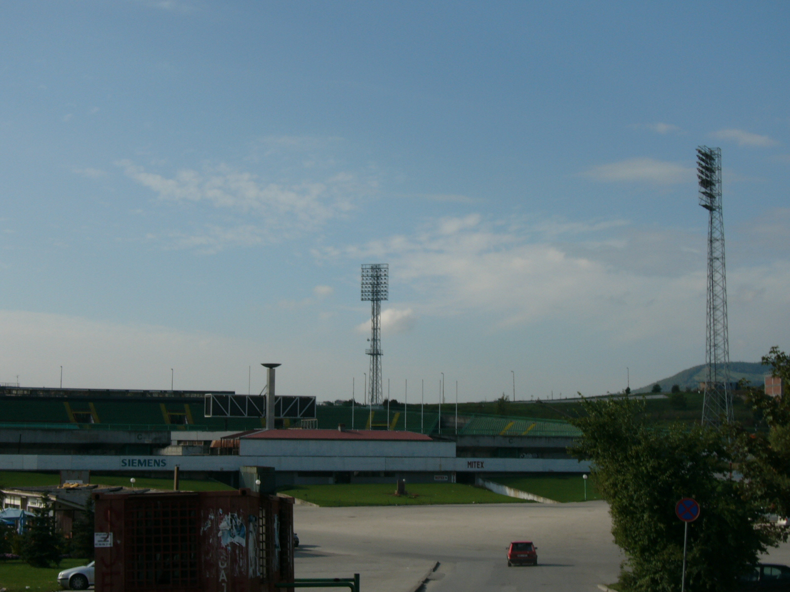 P1080082 Asim Ferhatovic Stadium